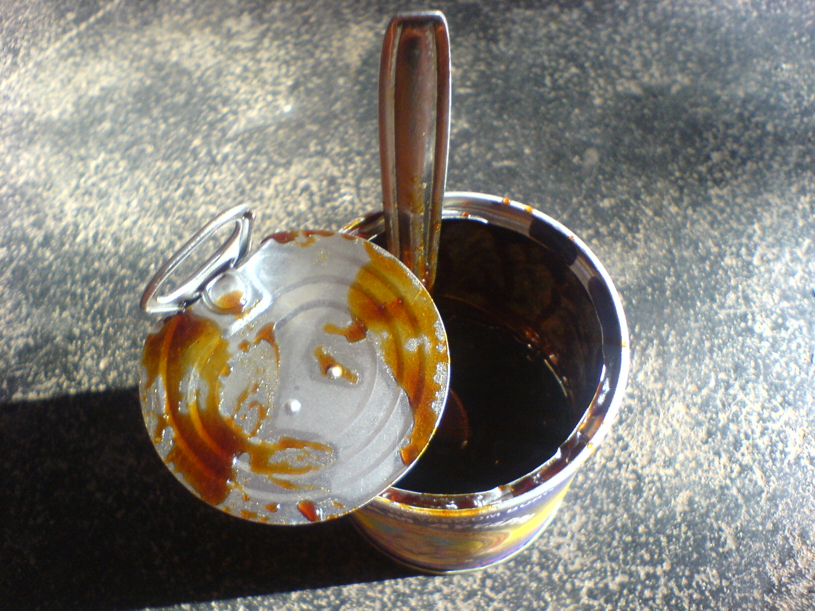 അരവണപ്പായസം